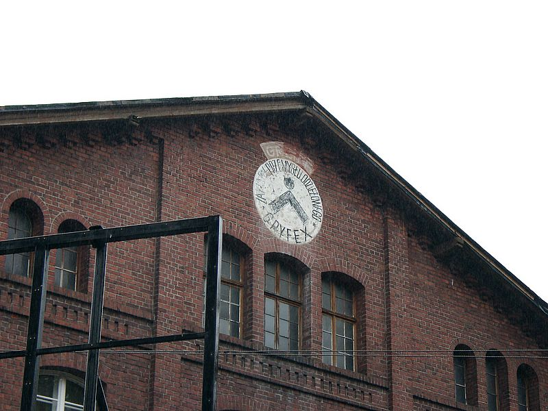 Stammwerk der Firma GREIFF Mode